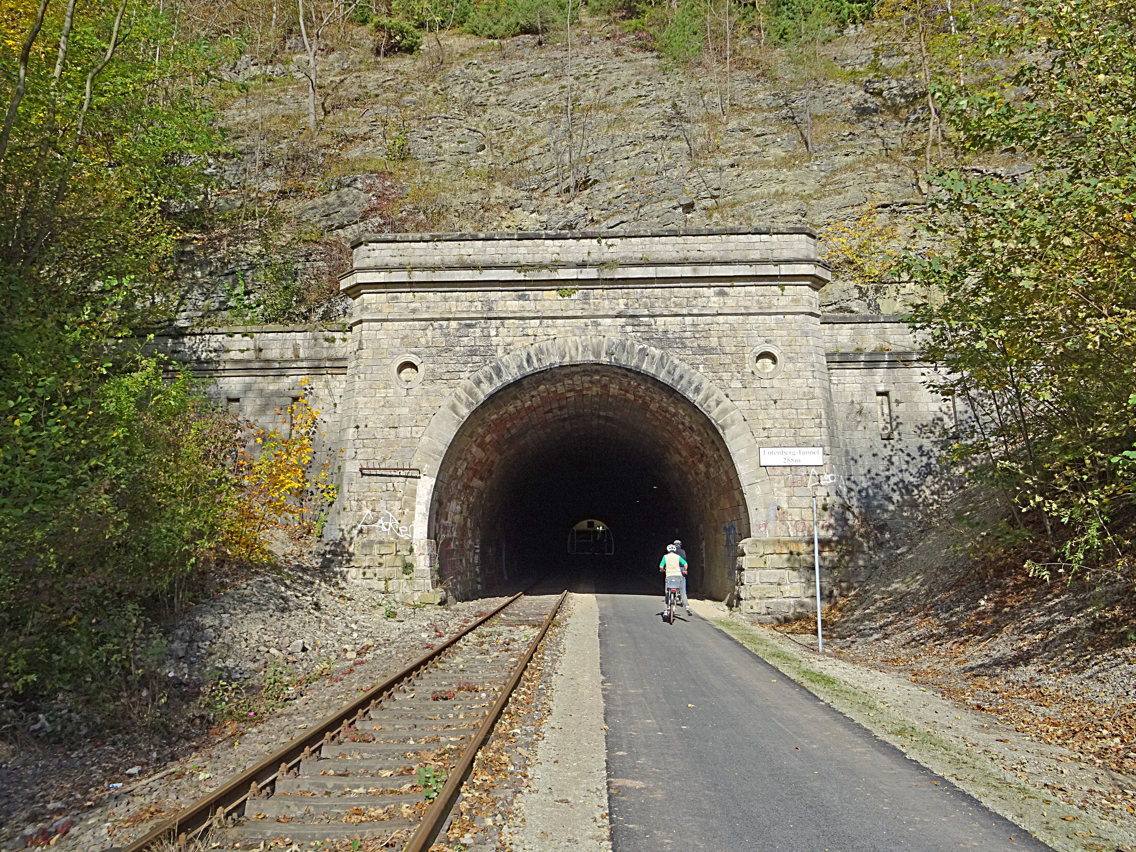 Entenberg-Tunnel 288 m